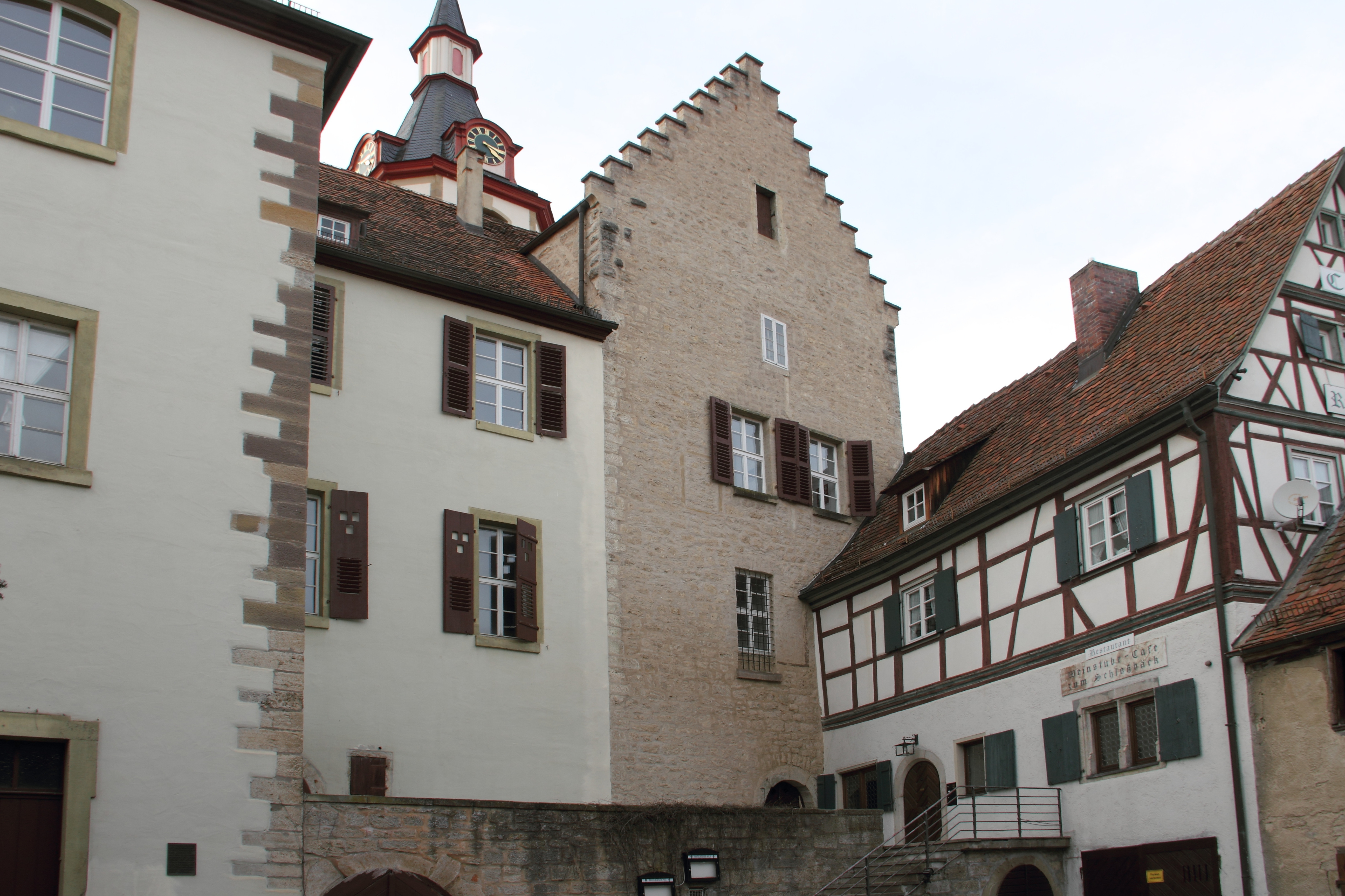 Das ehemalige Wasserschloss der Stadt Creglingen beherbergt heute das Evangelische Pfarramt.